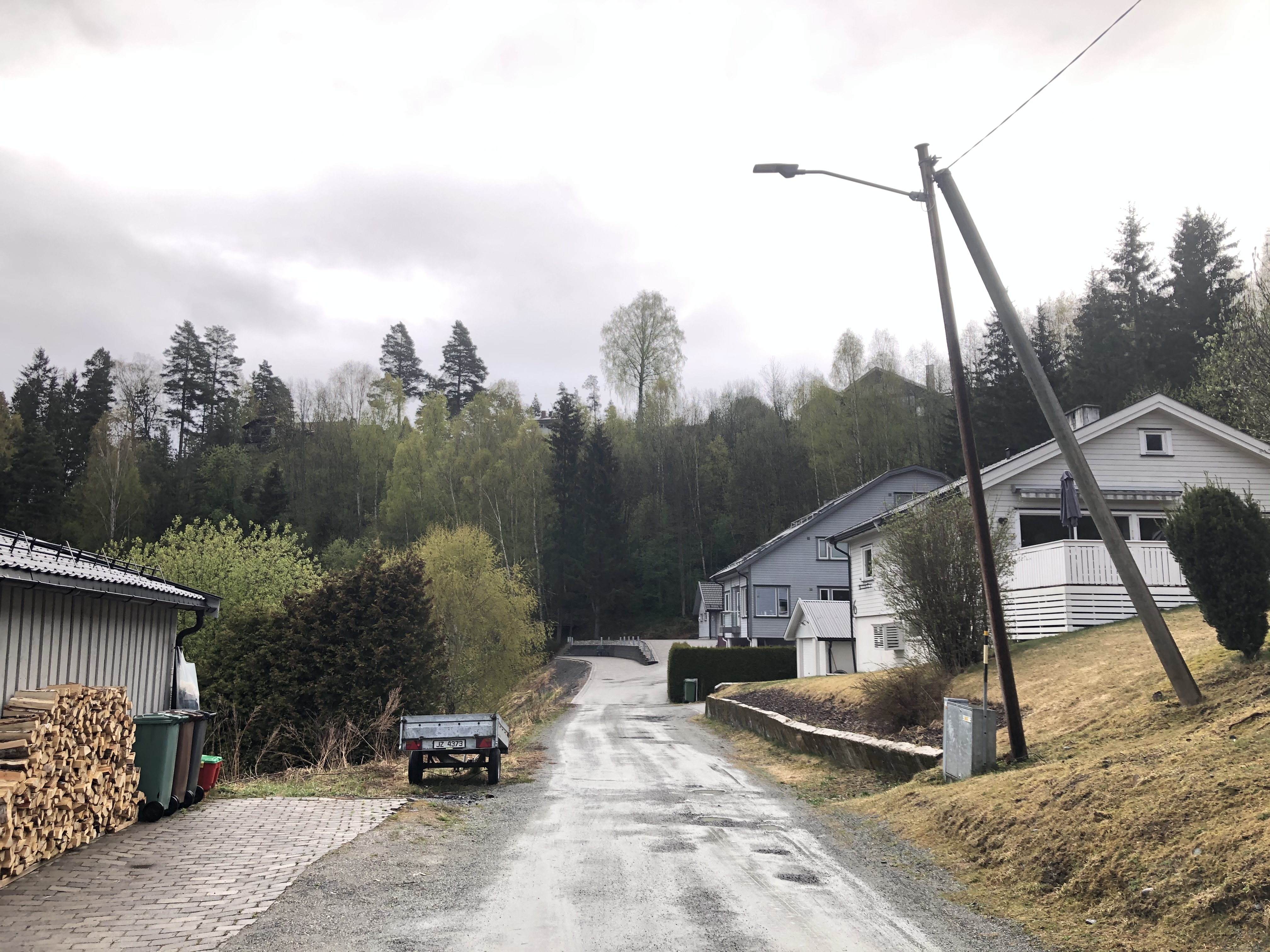 Granliveien, Ringerike